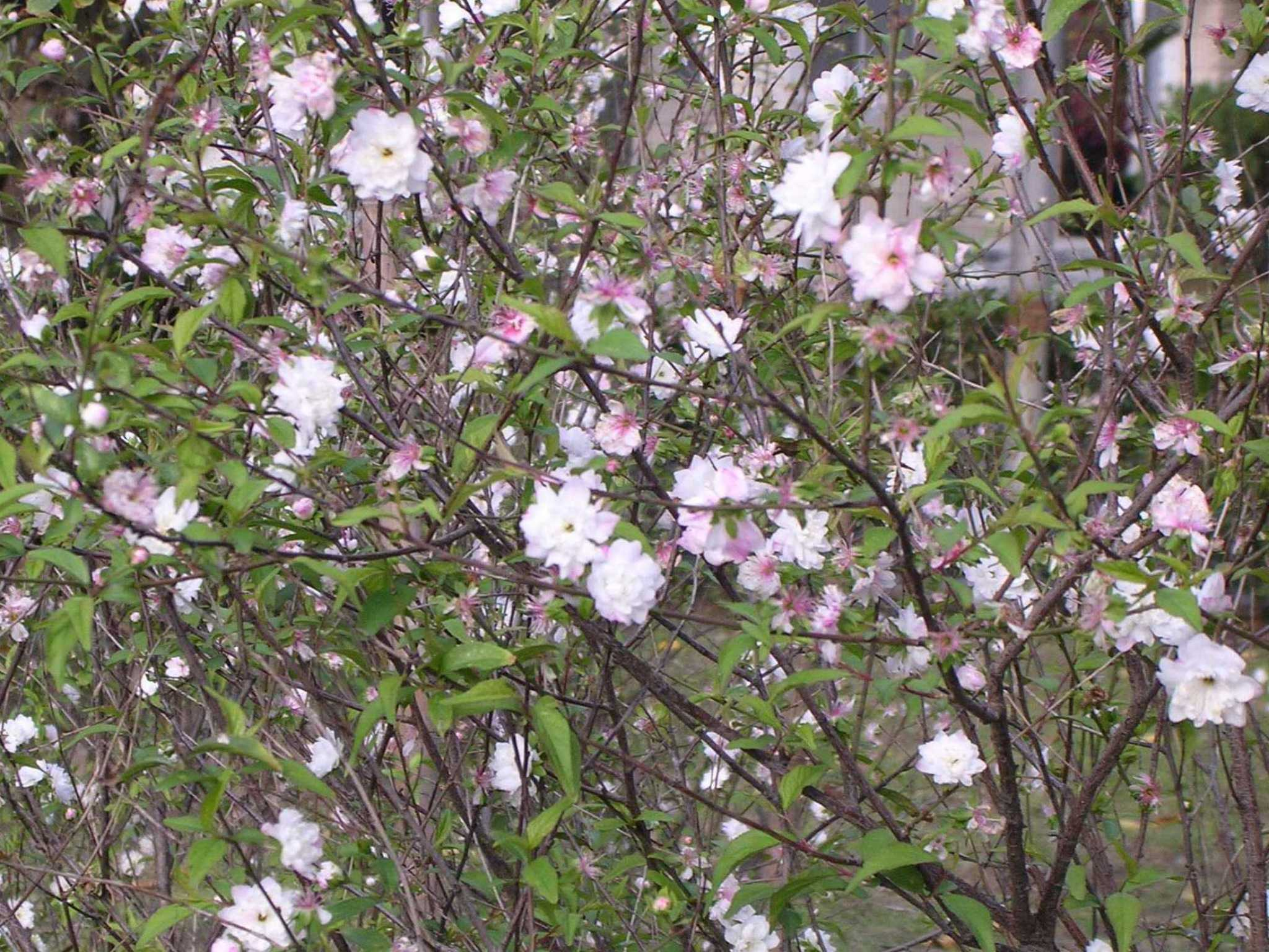 郁李